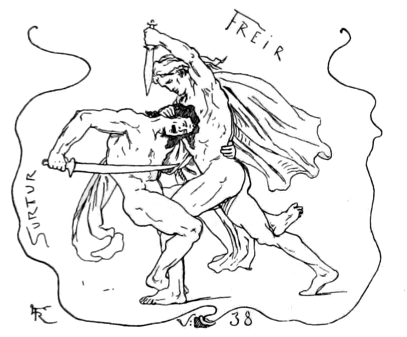 Freyr and Surtr do battle at Ragnarök.